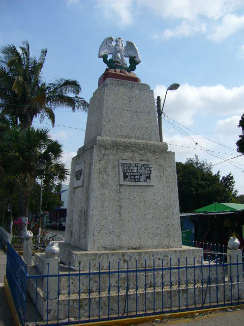 obelisco